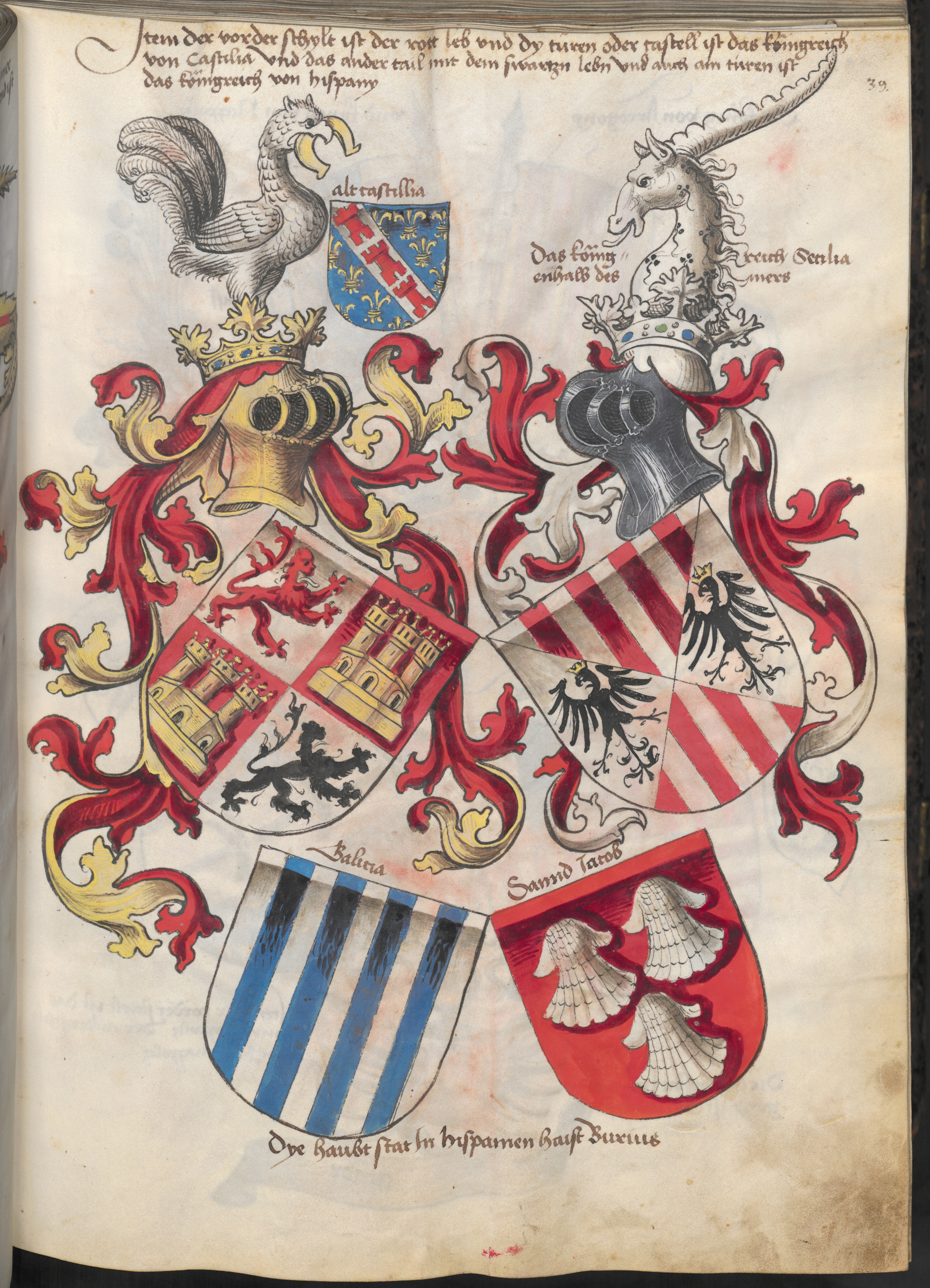 Páxina do armorial de Konrad Grünemberg onde aparecen os escudos de Alta Castela; Castela e León; a Sicilia aragonesa; Galiza e Santiago.